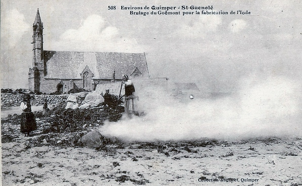 Saint-Guénolé : brûlage du goémon devant la chapelle Notre-Dame-de-la-Joie (vers 1930)